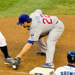 Xavier Nady